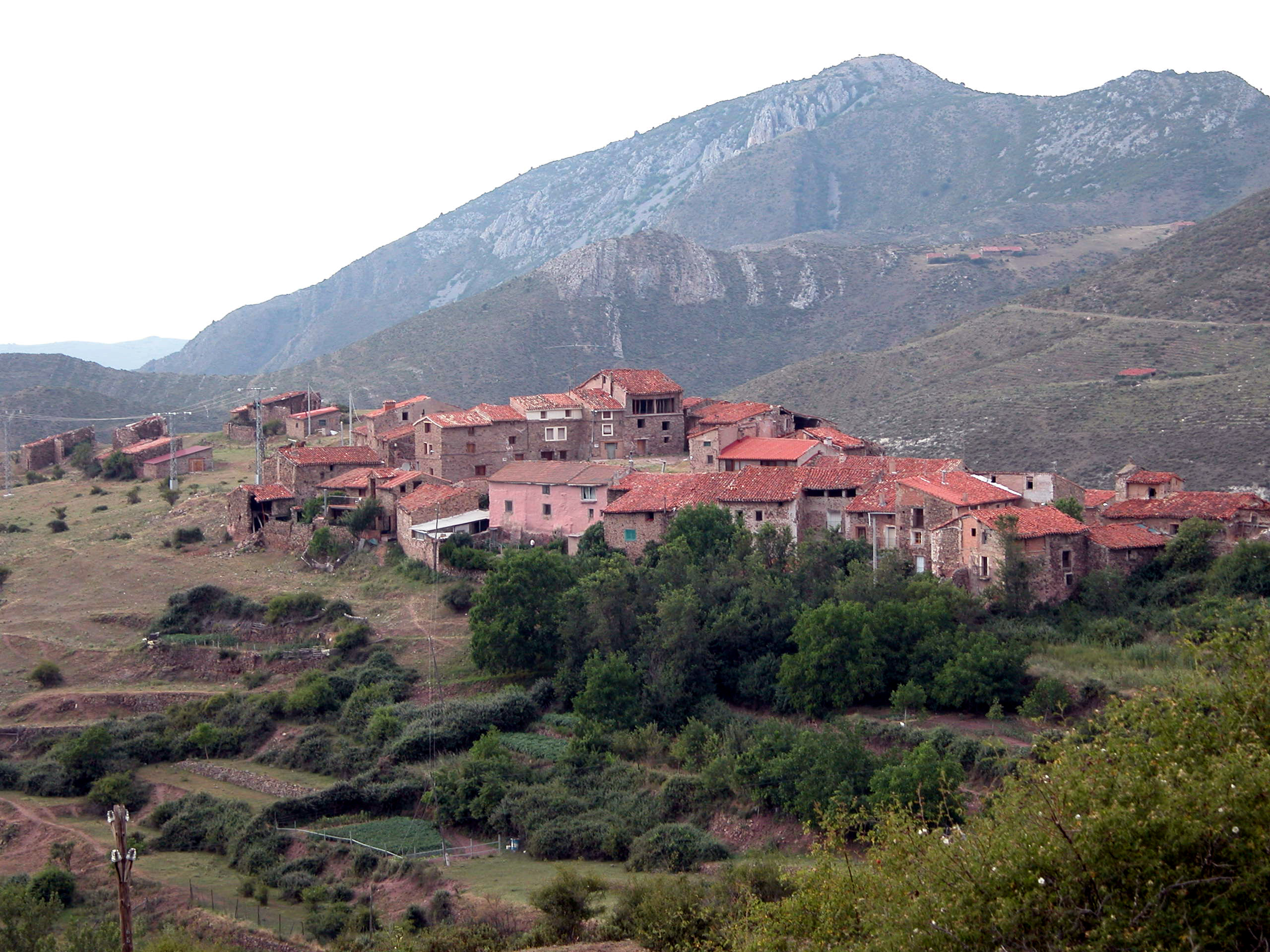 San Vicente de Robres, aldea de Robres del Castillo (La Rioja, España)